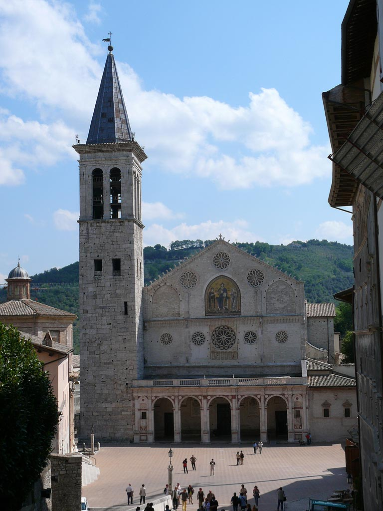 Cattedrale di S. Maria Assunta